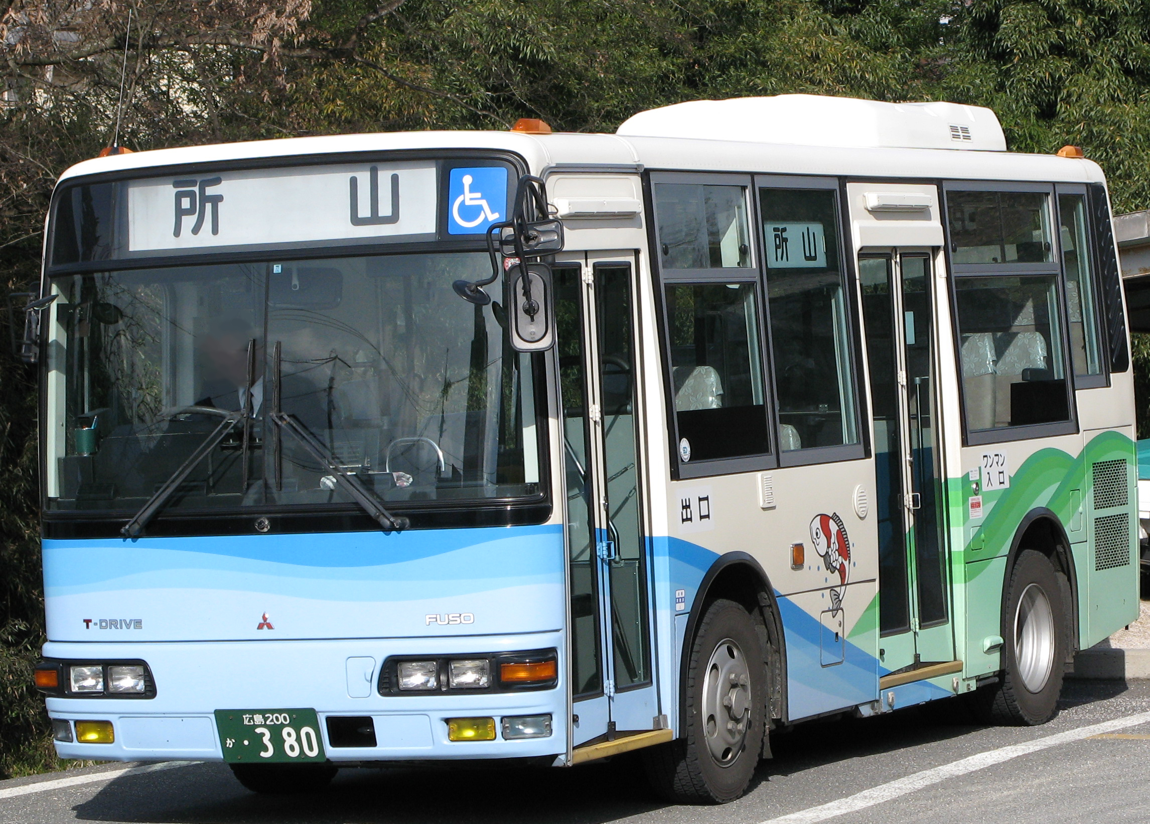 津田交通（広島県） 路線バスの車両